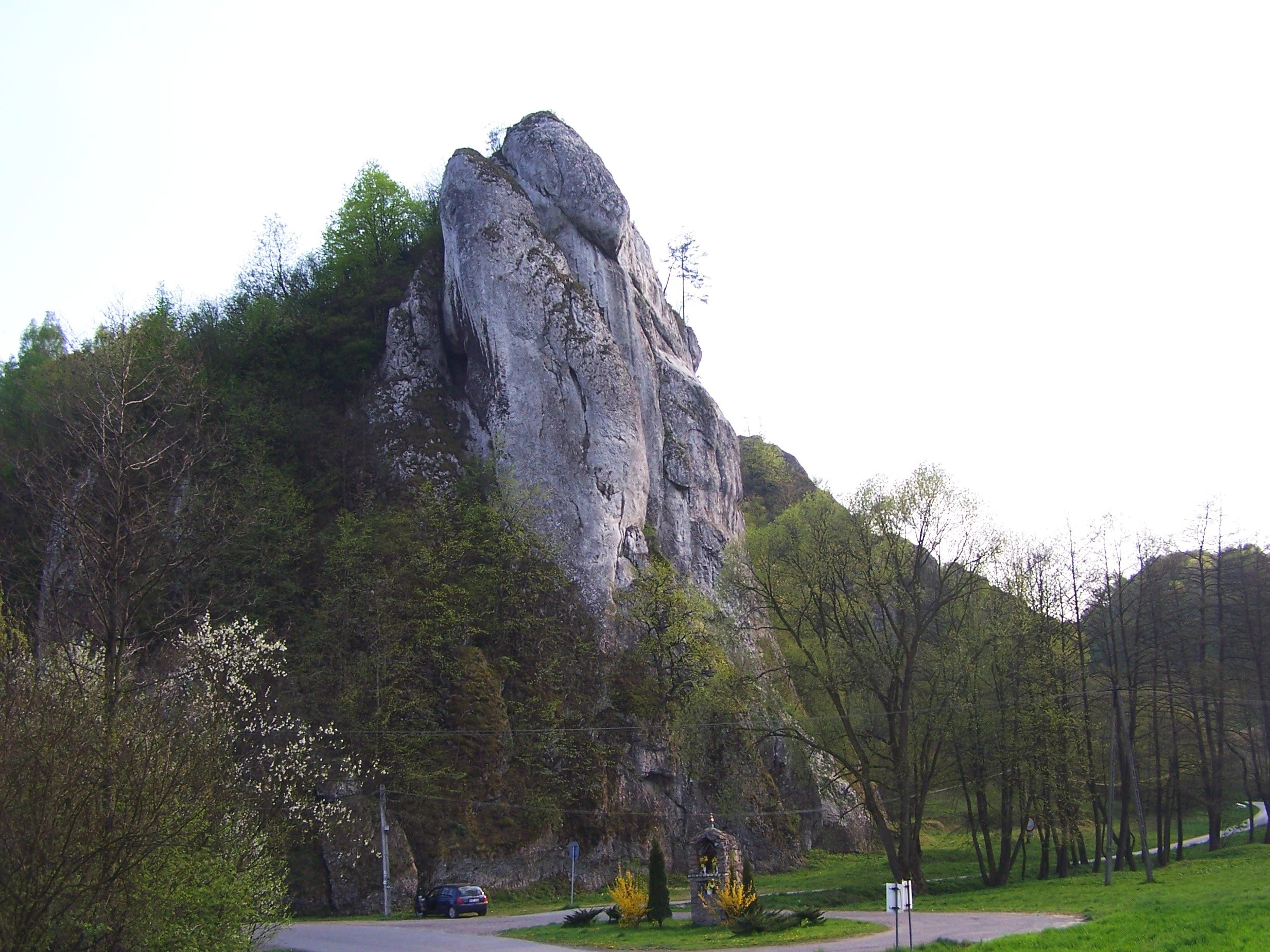 Rezerwat przyrody Zimny Dół